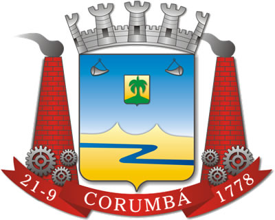 Coat of arms of Corumbá city, in Mato Grosso do Sul State, Brazil. All the images of Brazilian states or cities flags and coat of arms (official symbols) are in public domain. Brasão da cidade de Corumbá no estado de Mato Grosso do Sul, Brasil. Todas as imagens de bandeiras de estados ou cidades brasileiros e brasões (símbolos oficiais) estão em domínio público.